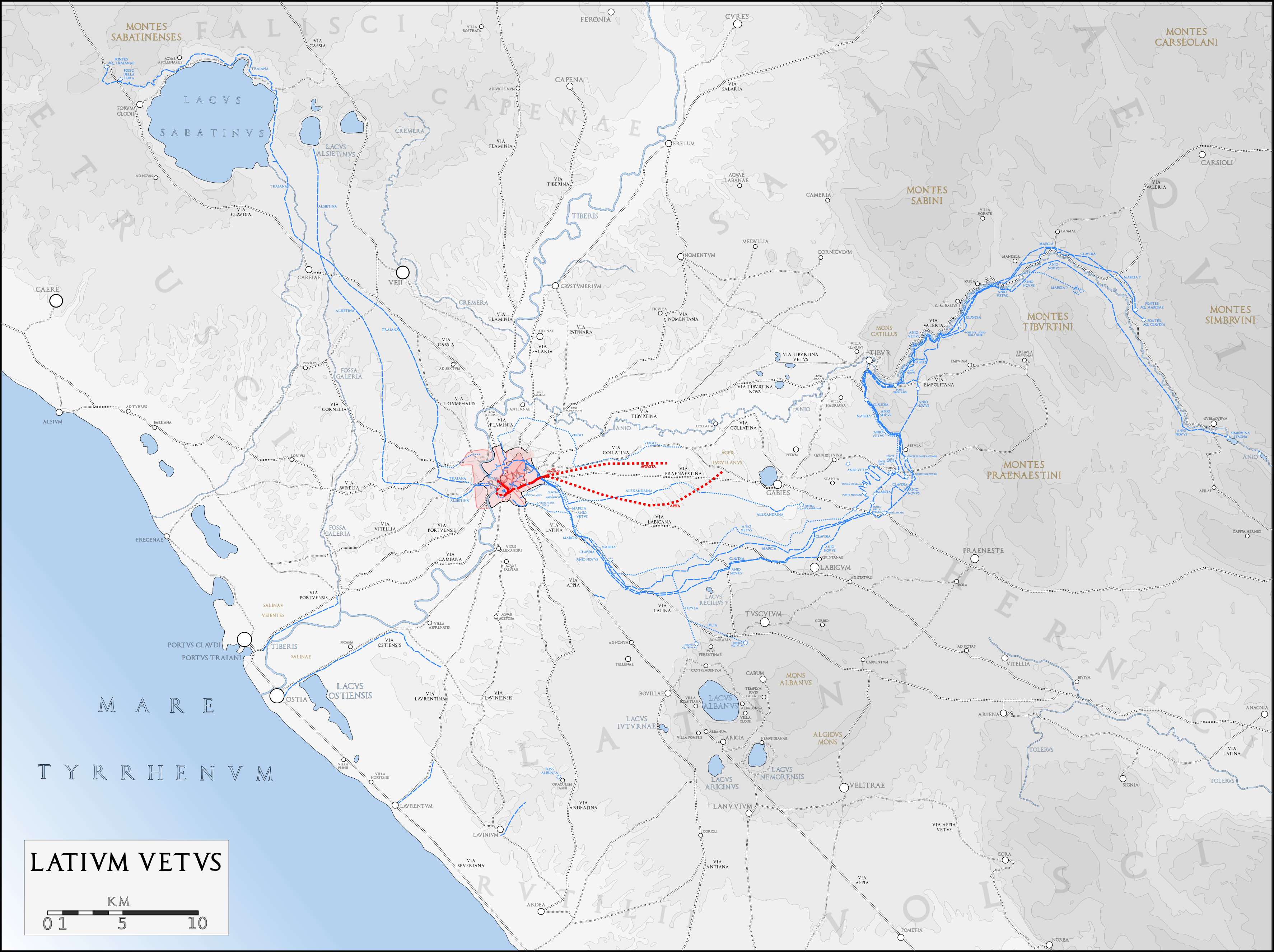 Carte du Latium antique sur lequel figure le tracé des aqueducs de Rome. D'après un fond de carte de 1886 (G. Droysens Allgemeiner Historischer Handatlas).